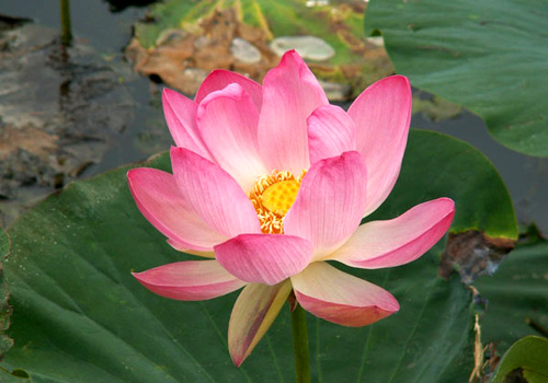 Лотос в Славянском районе